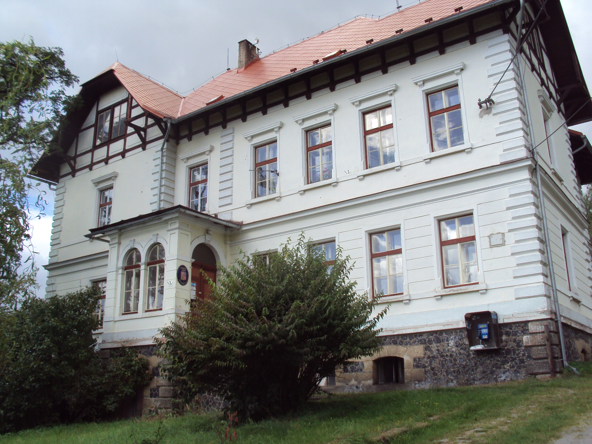 Obecní úřad Slunečná v budově č.p.104, bývalá škola